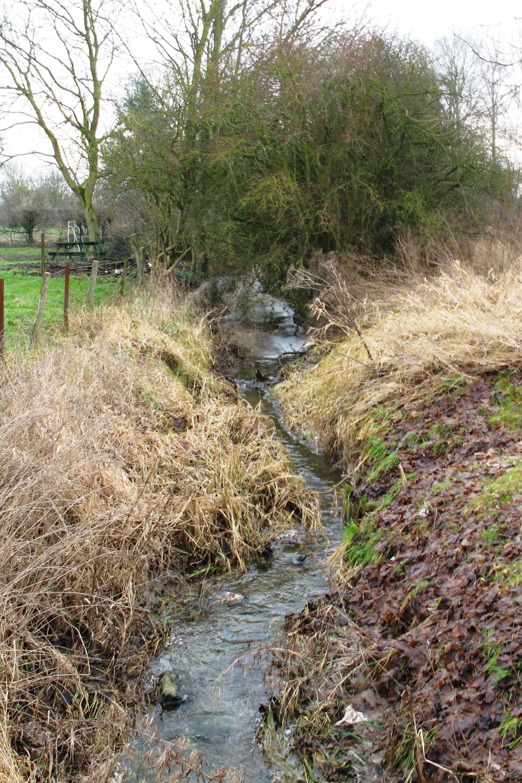 De Ruisseau d'Acosse an der Uertschaft Acosse. Acosse